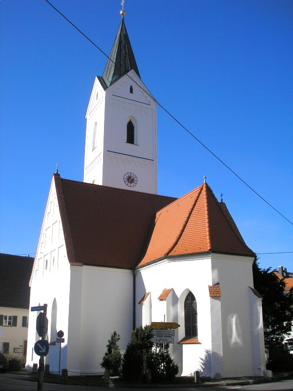 St. Leonhard (Fürstenfeldbruck, Oberbayern). Gesamtansicht. Eigene Aufnahme, Jan. 2007 / St. Leonhard (Fürstenfeldbruck, Upper Bavaria, Germany). Total view. Own photo, Jan. 2007